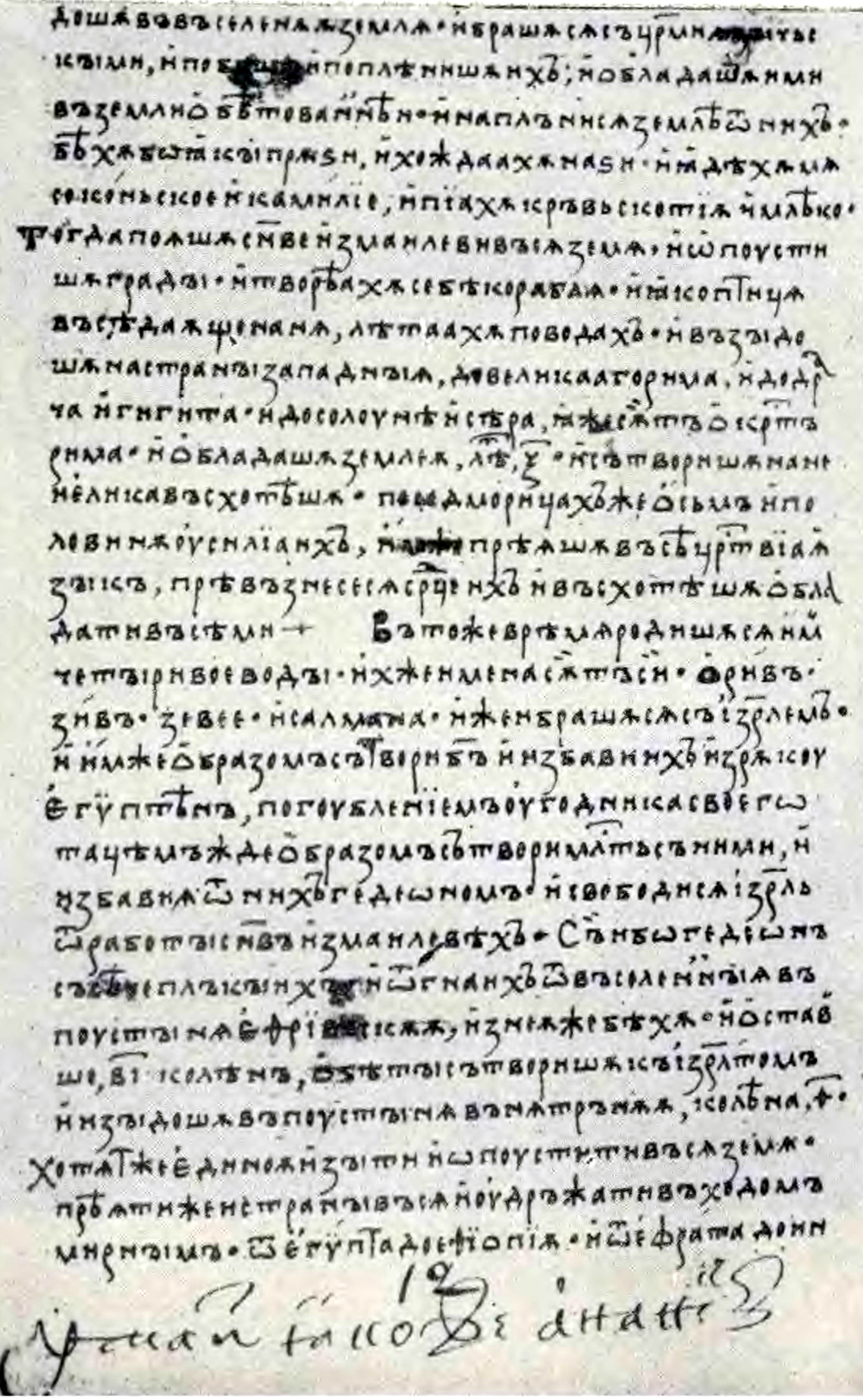 Ловчански сборник („Попфилипов сборник“)